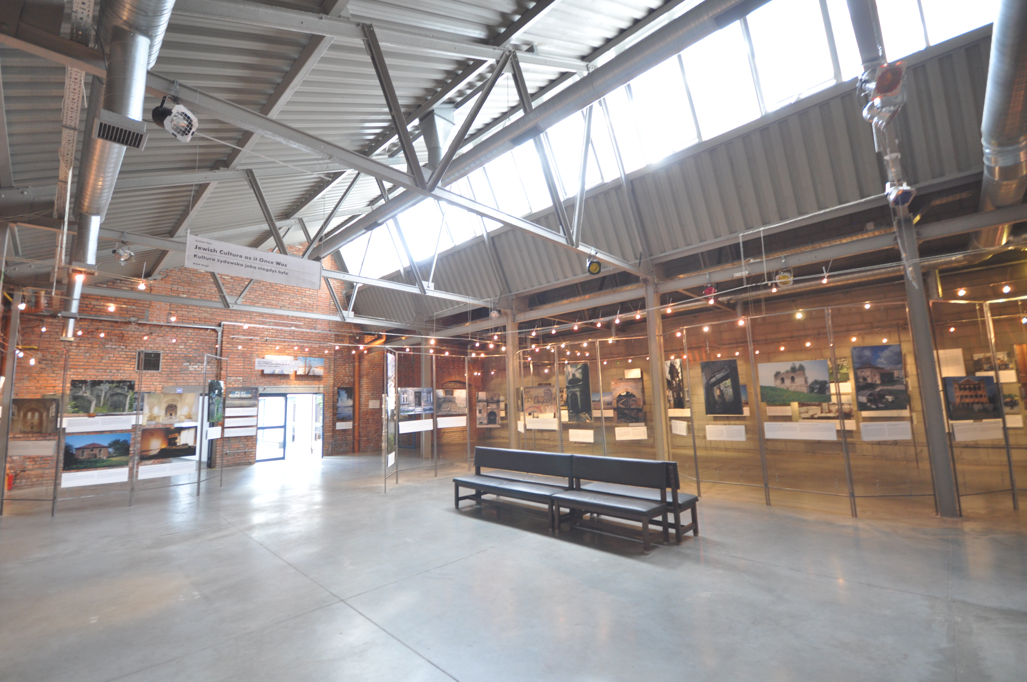 Żydowskie Muzeum Galicja w Krakowie